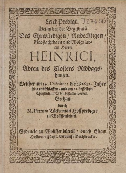 Leichenpredigt des Wolfenbütteler Hofpredigers Peter Tückermann auf Abt Heinrich Scheele von Riddagshausen, 1622